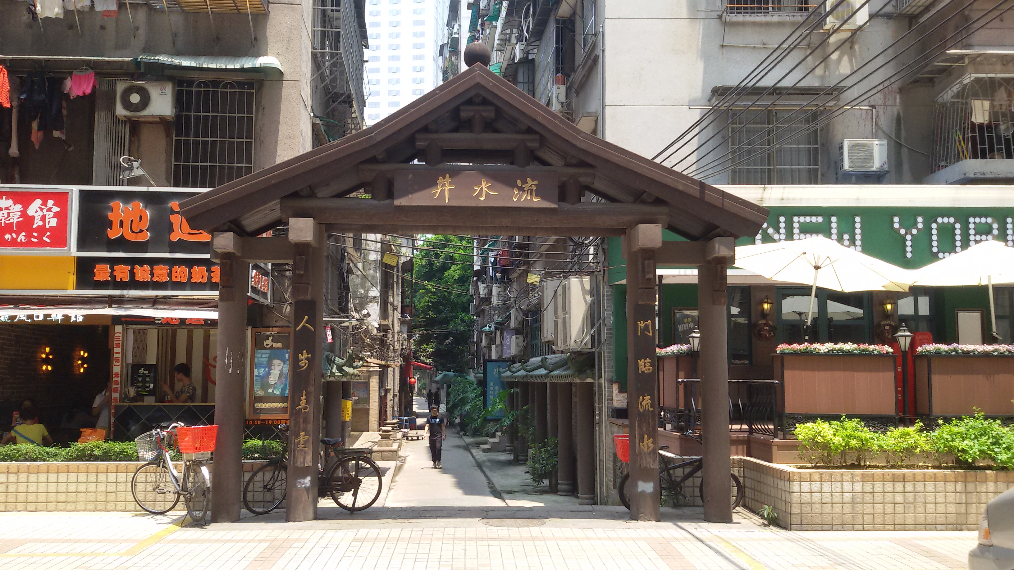 粵語: 流水井南边嘅牌坊